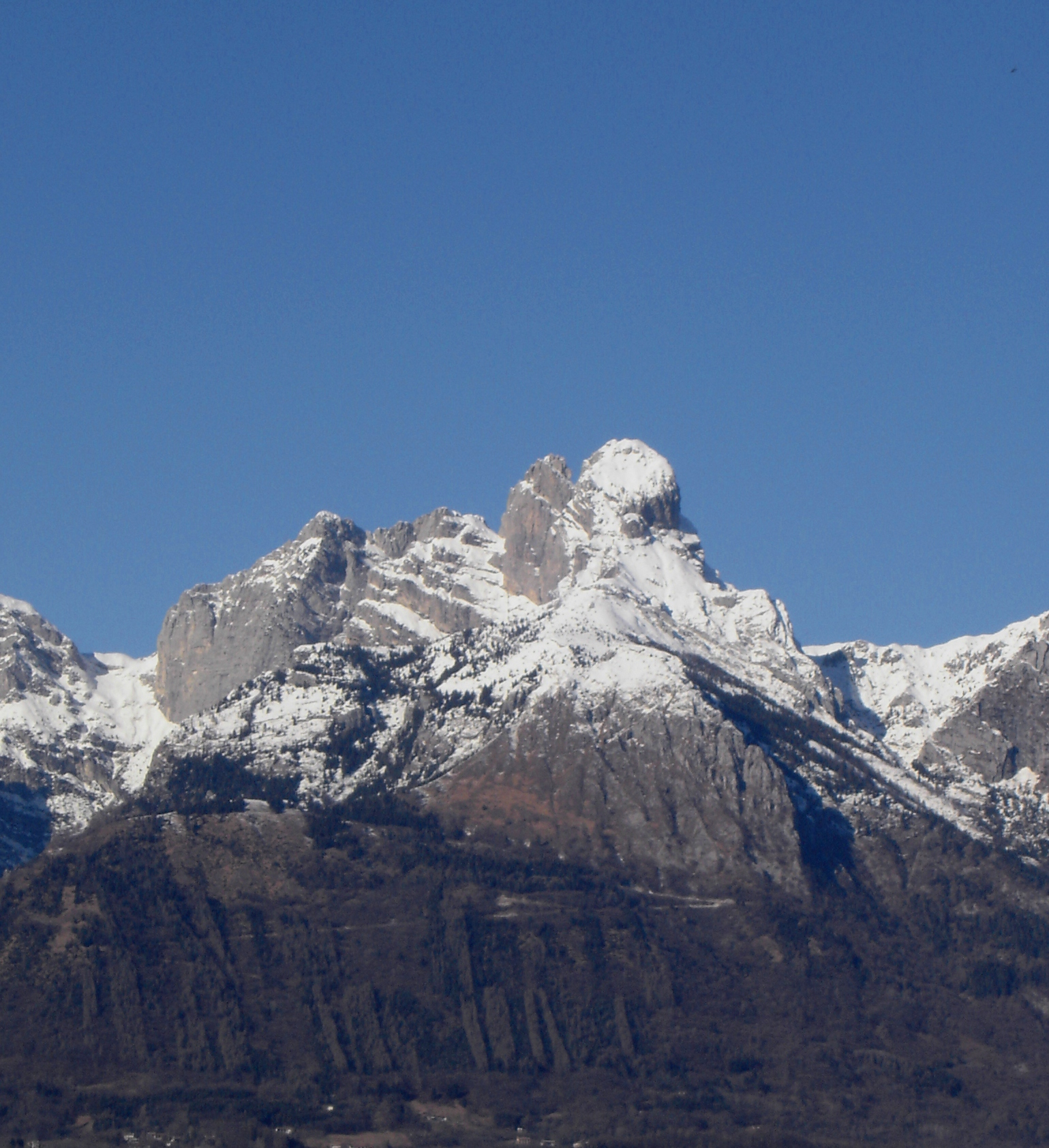 foto scattata da Armandoria il 23/01/2008